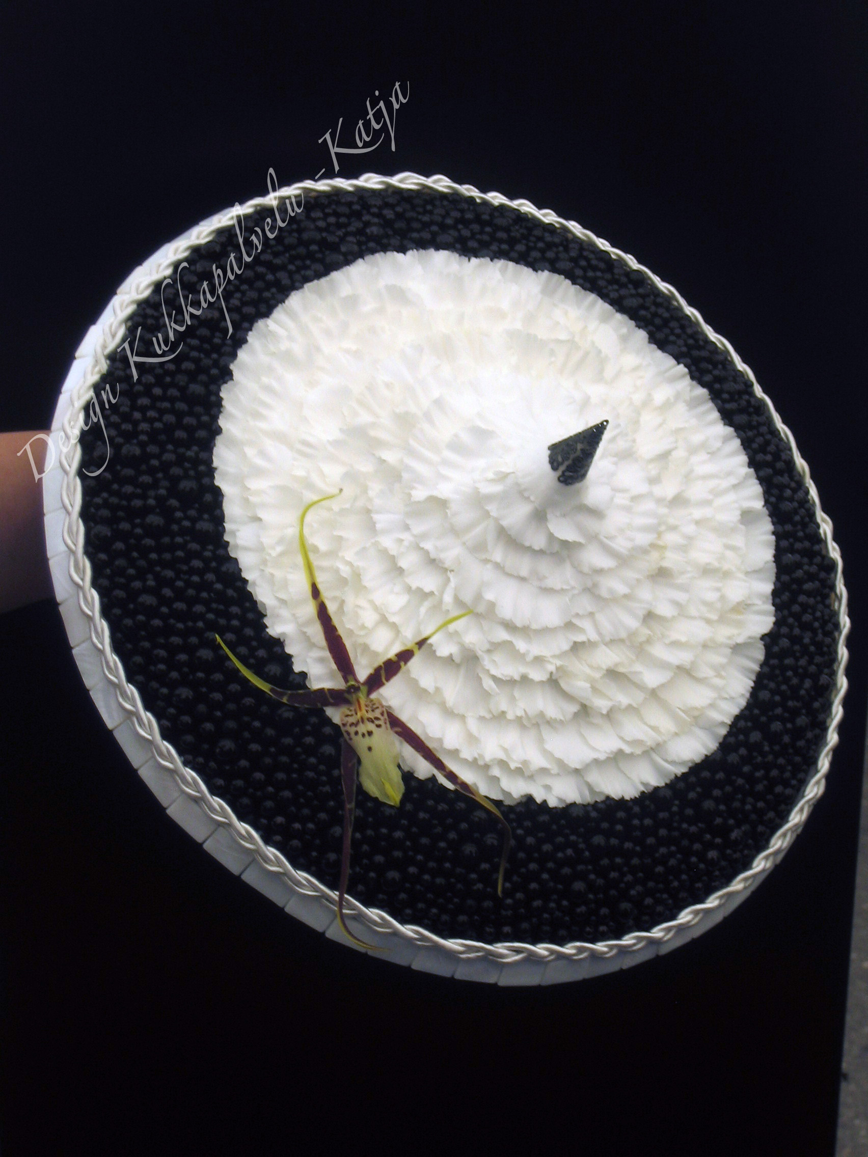 Morsiuskimppu - muotosidonta tyylisuunta